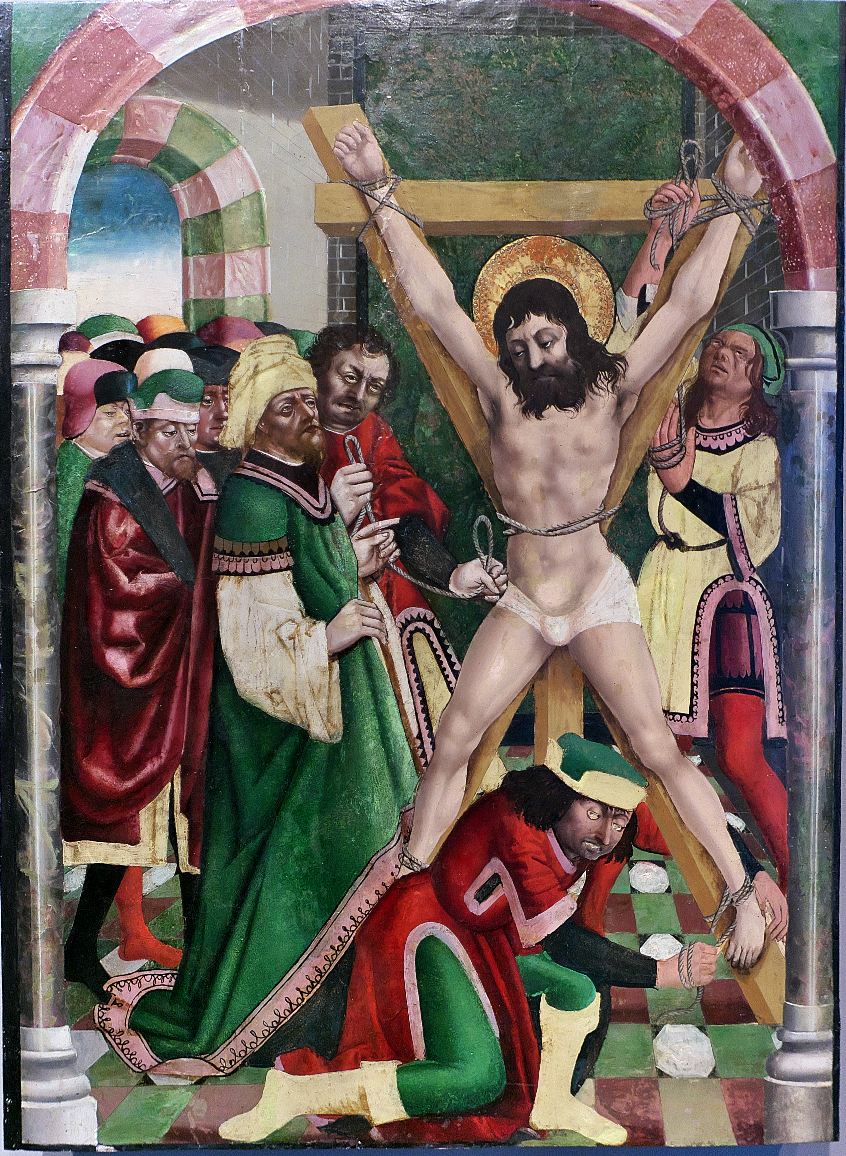 Museo de Navarra. Pintura gótica hispano-flamenca de Pedro Díaz de Oviedo, sobre tabla, componente de un retablo (ca. 1495) para la Capilla de San Andrés (Catedral de Tarazona), promovido por el obispo Andrés Martínez Ferriz.